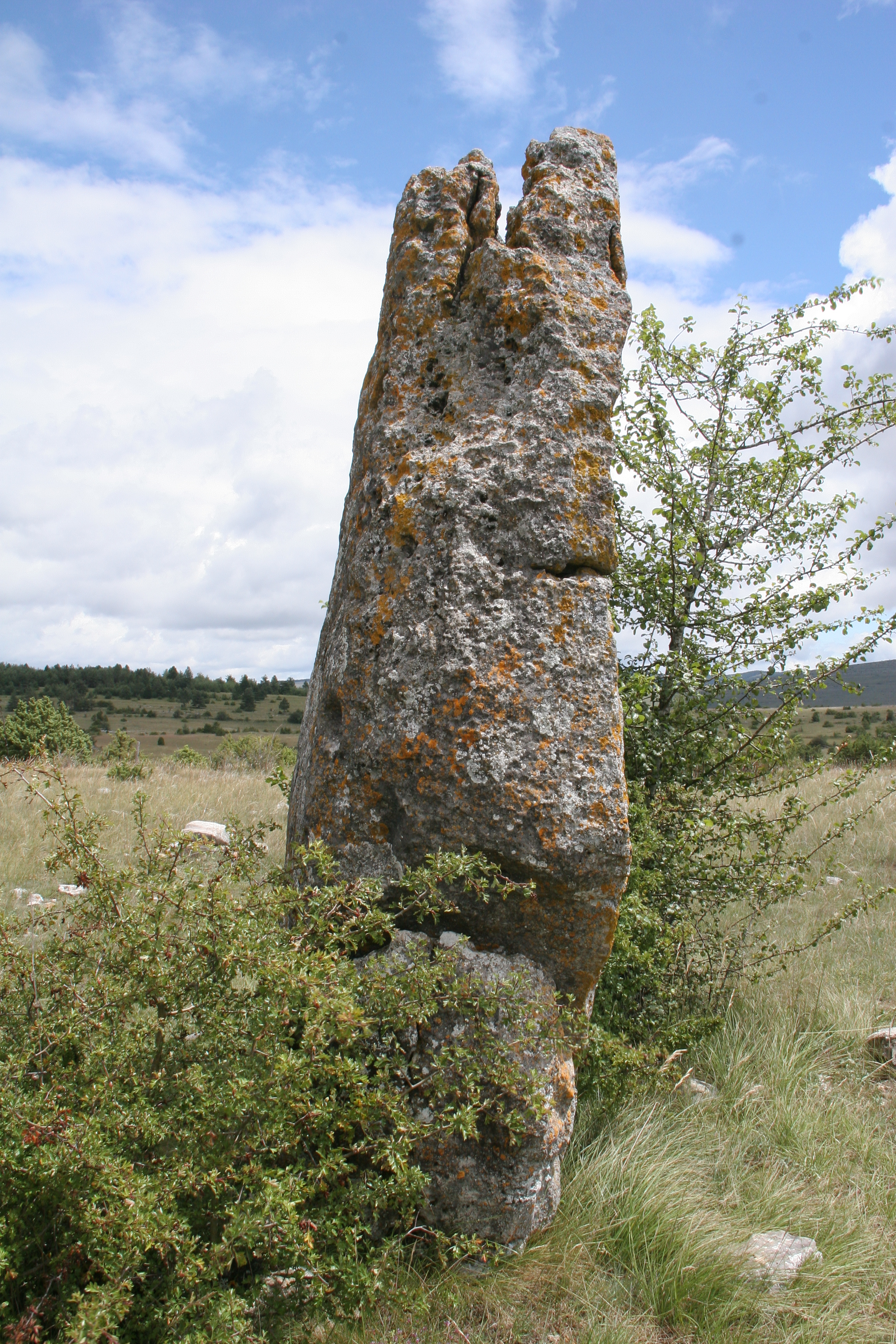 Menhir du Fraïsse (Mas-Saint-Chély)